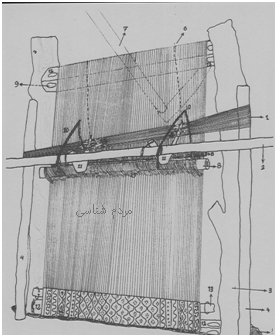 طرحی ازدستگاه زیلوبافی است که شرح آن درمقاله ی زیلو آمده است